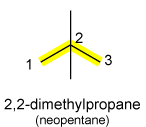 IUPAC naming (alkane)